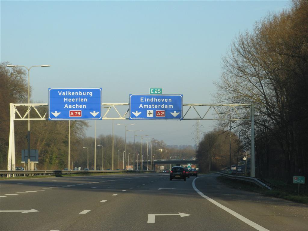 Knooppunt Kruisdonk vanuit Maastricht.